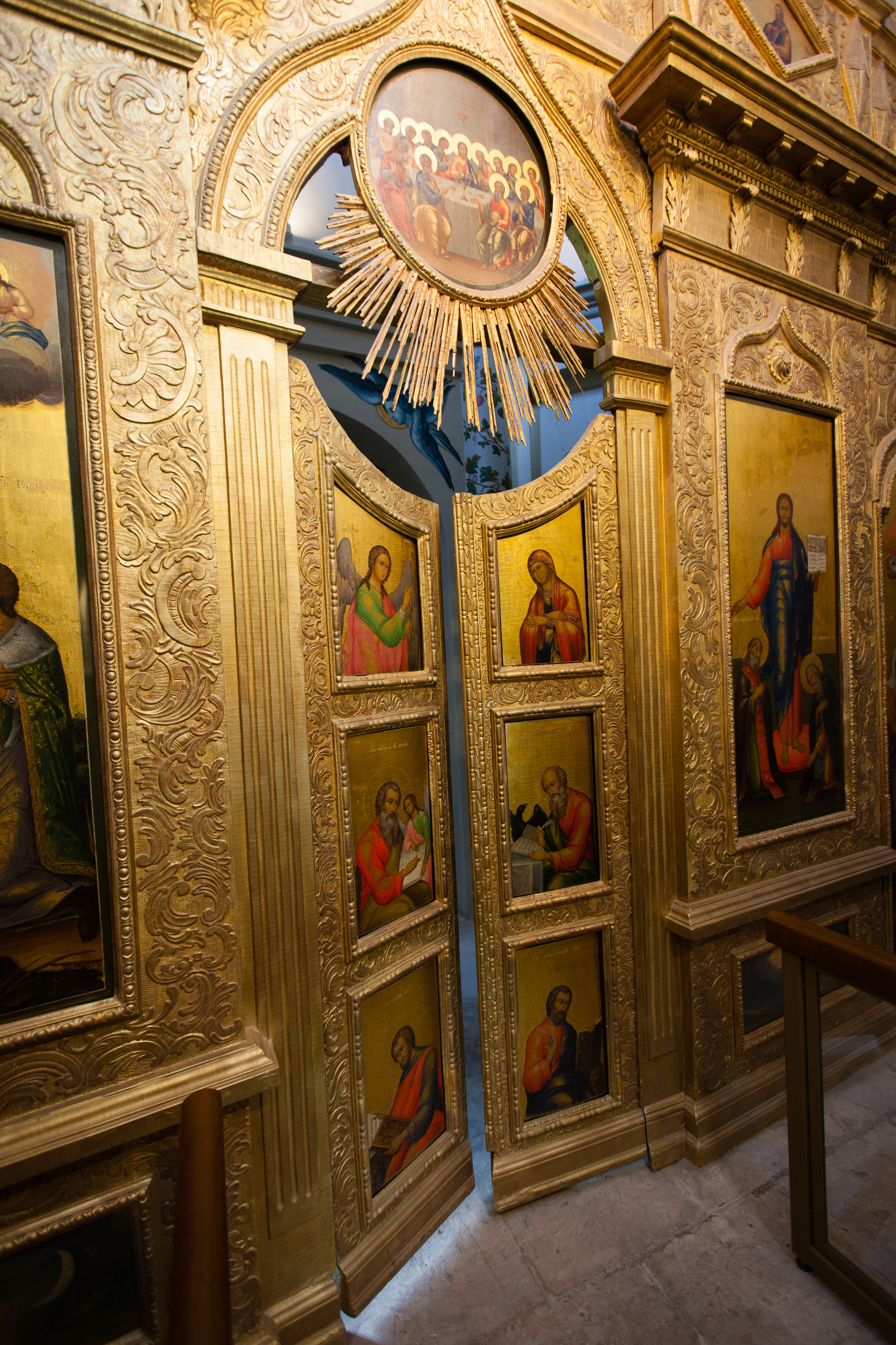 Moscow